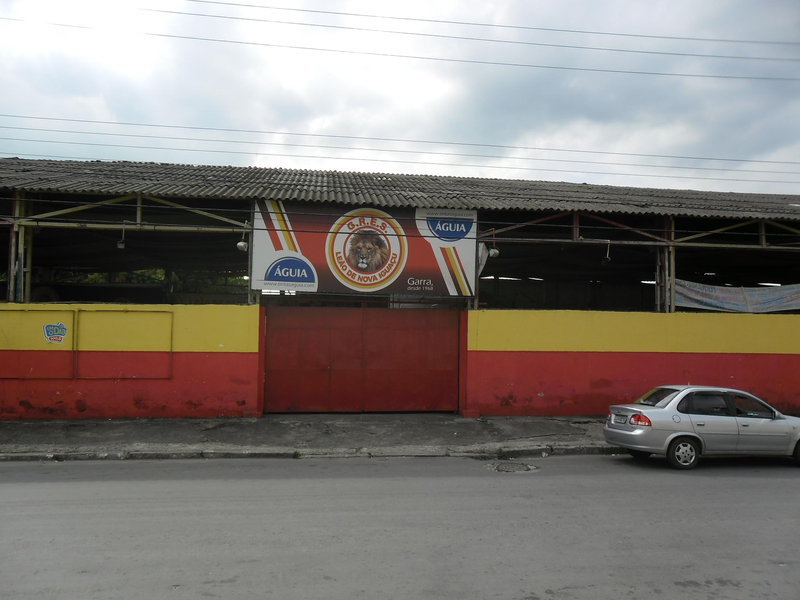 GRES Leão de Nova Iguaçu - quadra